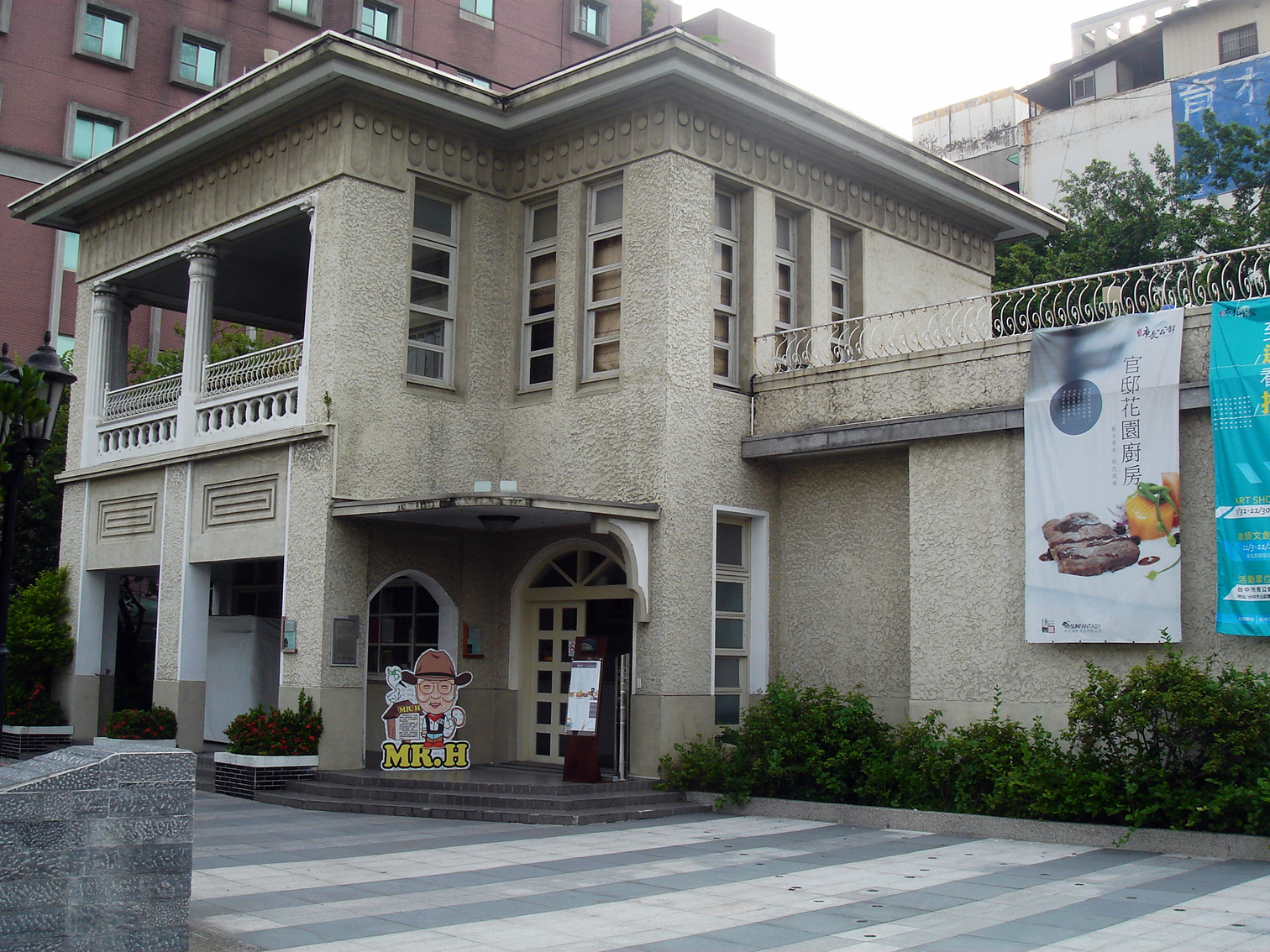 台中市長官邸藝廊。